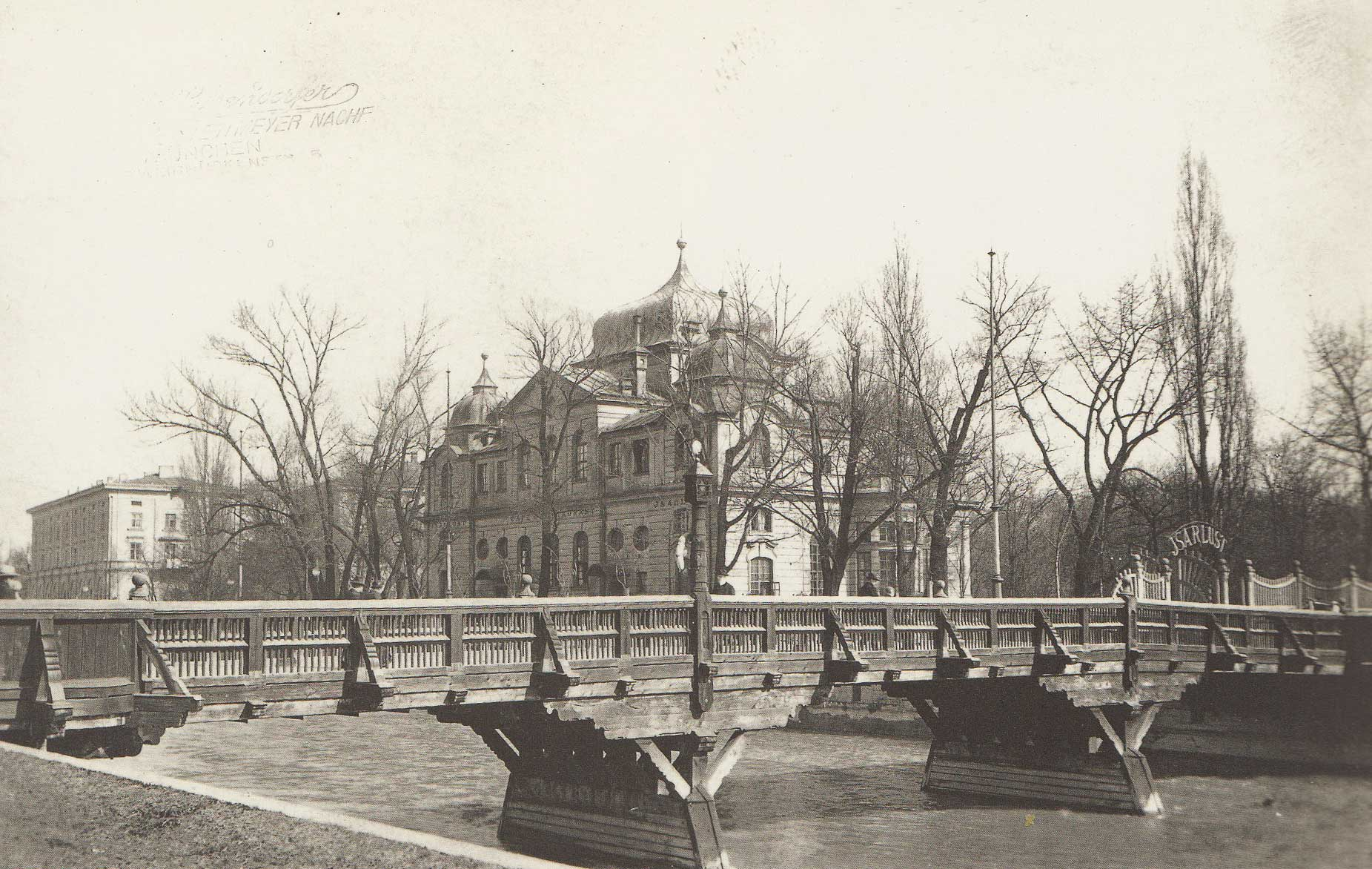 Das Restaurant Isarlust auf der Münchener Praterinsel (1905). Im Hintergrund sieht man die Likörfabrik Riemerschmid. In dem Gebäude befindet sich heute der Sitz des Deutschen Alpenvereins.